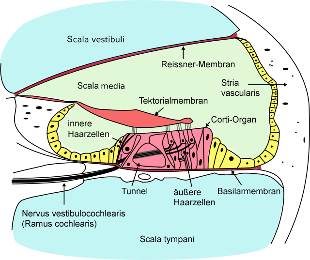 Schnitt (Schematisch) durch die Cochlea (Hörschnecke) des Innenohres Die nummerischen Farbwerte wurden mit der Software Gimp der Grafik entnommen und können in der Vorlage:Farblegende verwendet werden #80eaea Perilymphe der Scala vistibuli und Scala tympani #c0f2aa Endolymphe der Scala media #ff8da4 Corti-Organ #f86a6a Tektorialmembran #c52c4c Basilarmembran #ac6f83 Reissner-Membran #fef762 gelb (Stützzellen?)